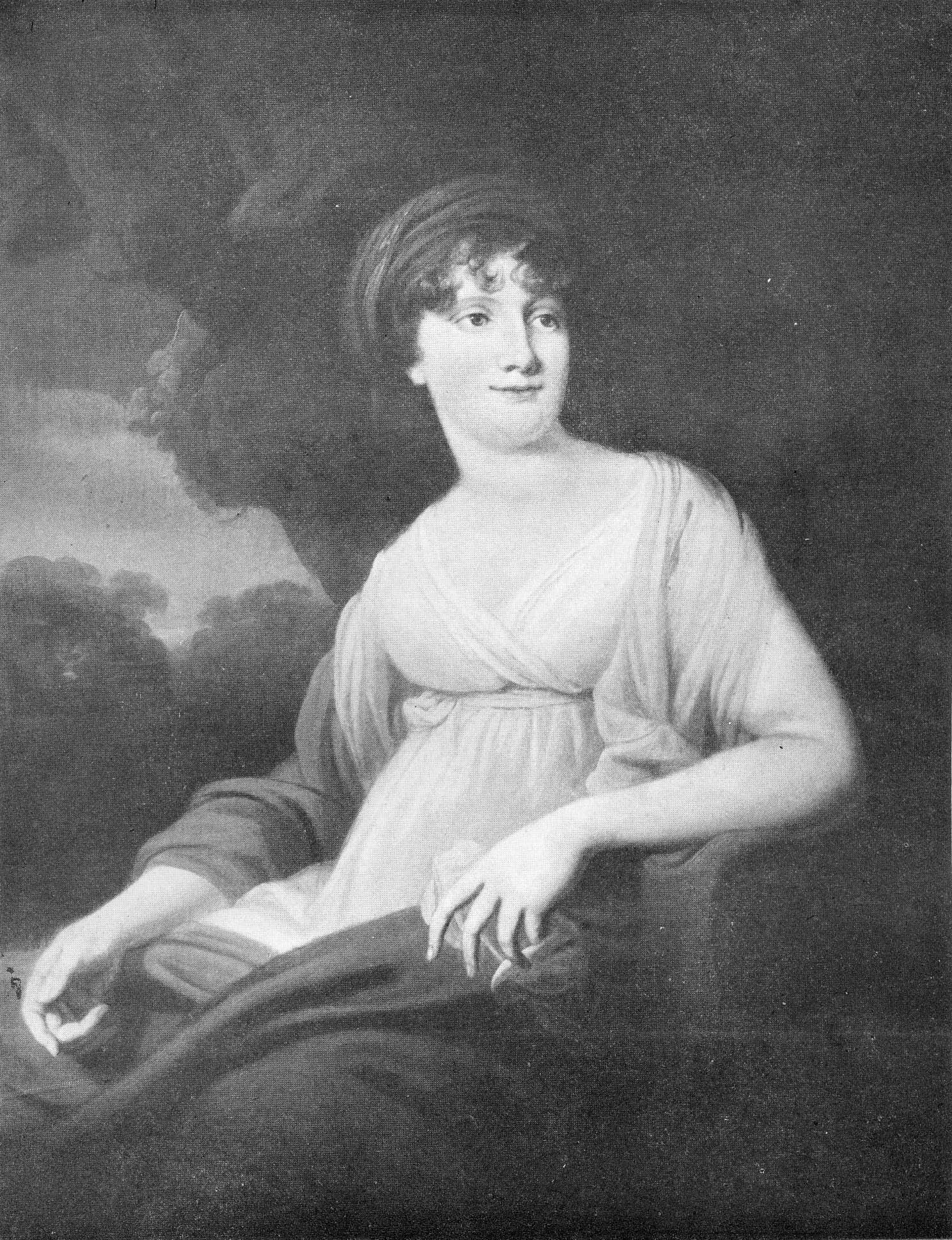 Countess Sofia Vladimirovna Panina, née Orlova (1774-1844)